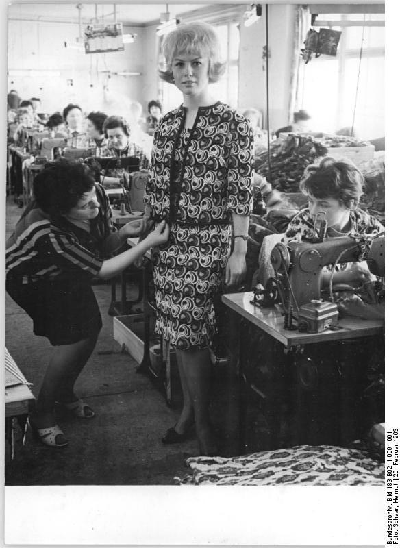 Zentralbild-Schaar Gal.-At. 20.2.1963 Firma Lucie Kaiser bereitet Messekollektion vor Hochbetrieb herrscht wie stets vor den Messen in den Arbeitsräumen der Firma Lucie Kaiser KG Altenburg. Die Näherinnen des Betriebes sind die Ersten, welche die neuen Messemodelle in Augenschein nehmen können, bevor sie dem Messepublikum vorgeführt werden. Eine Messeneuheit der PGM "Plauener Spitze" Plauen, eine schwarz-weiße Luftspitze, wurde in den Ateliers der Firma Lucie Kaiser zu einem kleinen zweiteiligen Festkleid verarbeitet. Es ist mit reiner Seide (Chinaimport) eingefasst und abgefüttert. Ubz.: Erika Hammerschmidt, Meisterin und Lehrausbilderin (links) gibt den letzten Schliff.